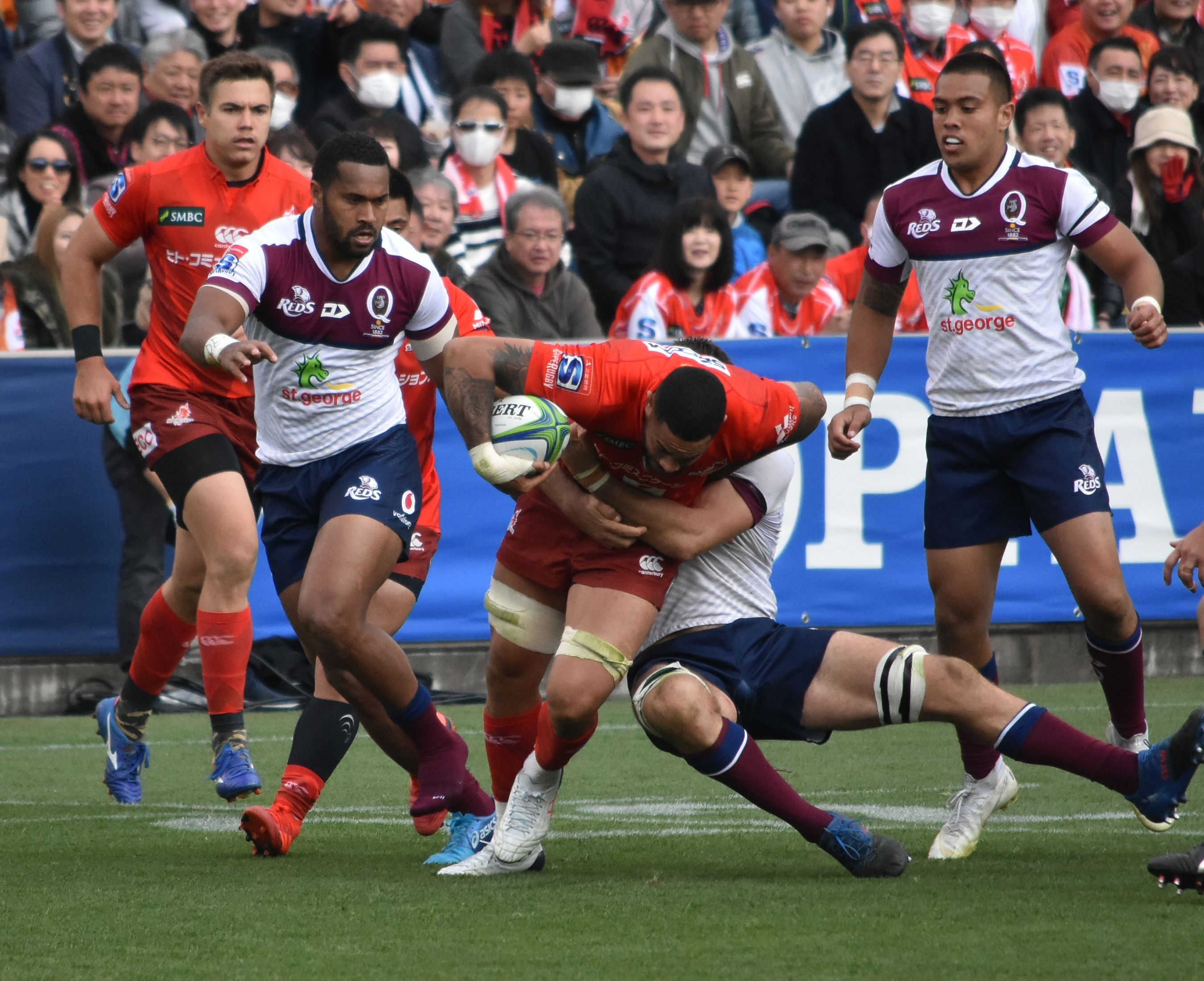 ラーボニ・ウォーレンボスアヤコ。秩父宮ラグビー場にて。 Nikon D3400